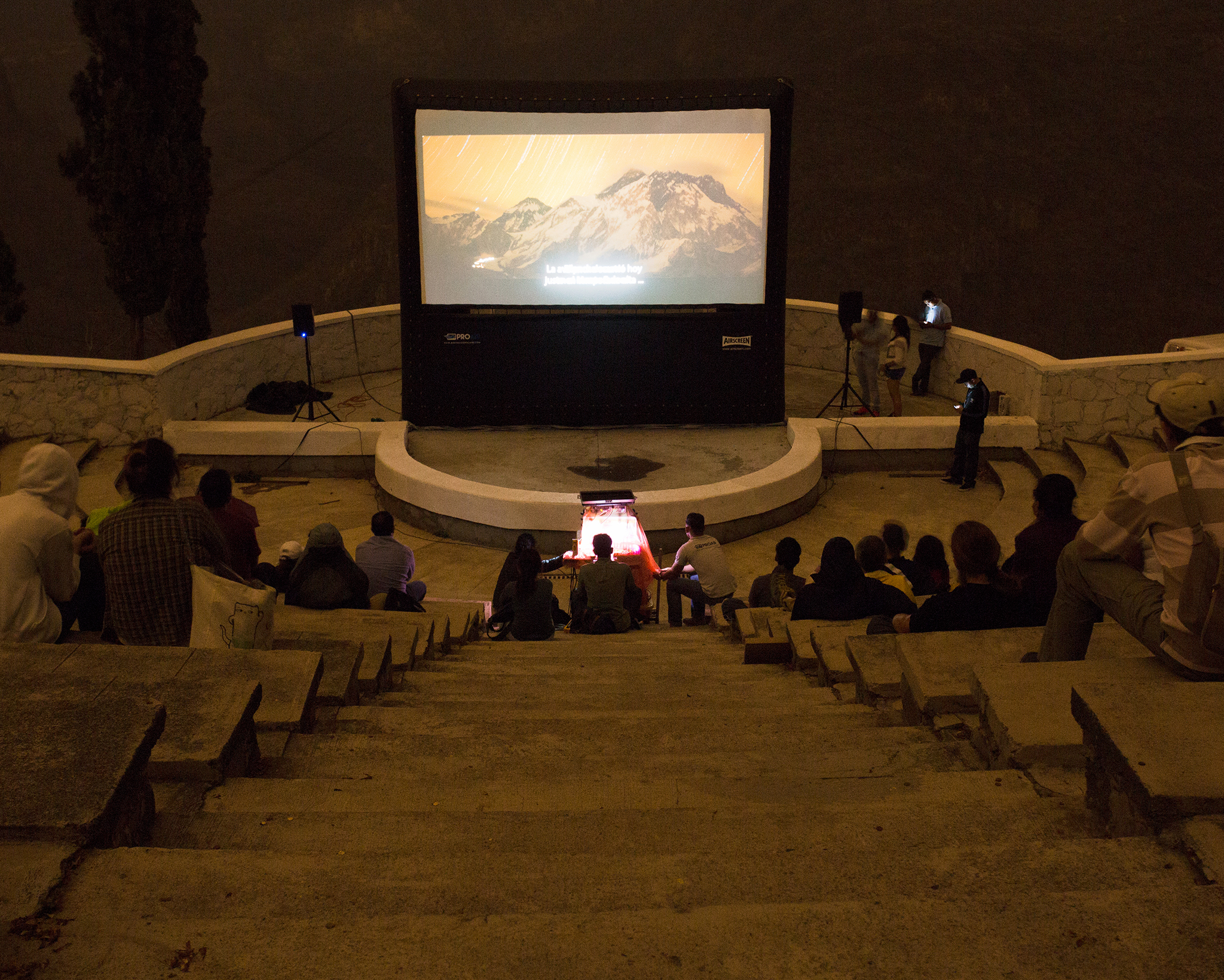 Festival Ambulante. Función, desafío "Sherpa". Parque Mirador Independencia, Barranca de Huentitán. 13 de Mayo. Guadalajara, Jalisco. Esta fotografía fue realizada con equipo R7D. Foto: Cristina Cerda.